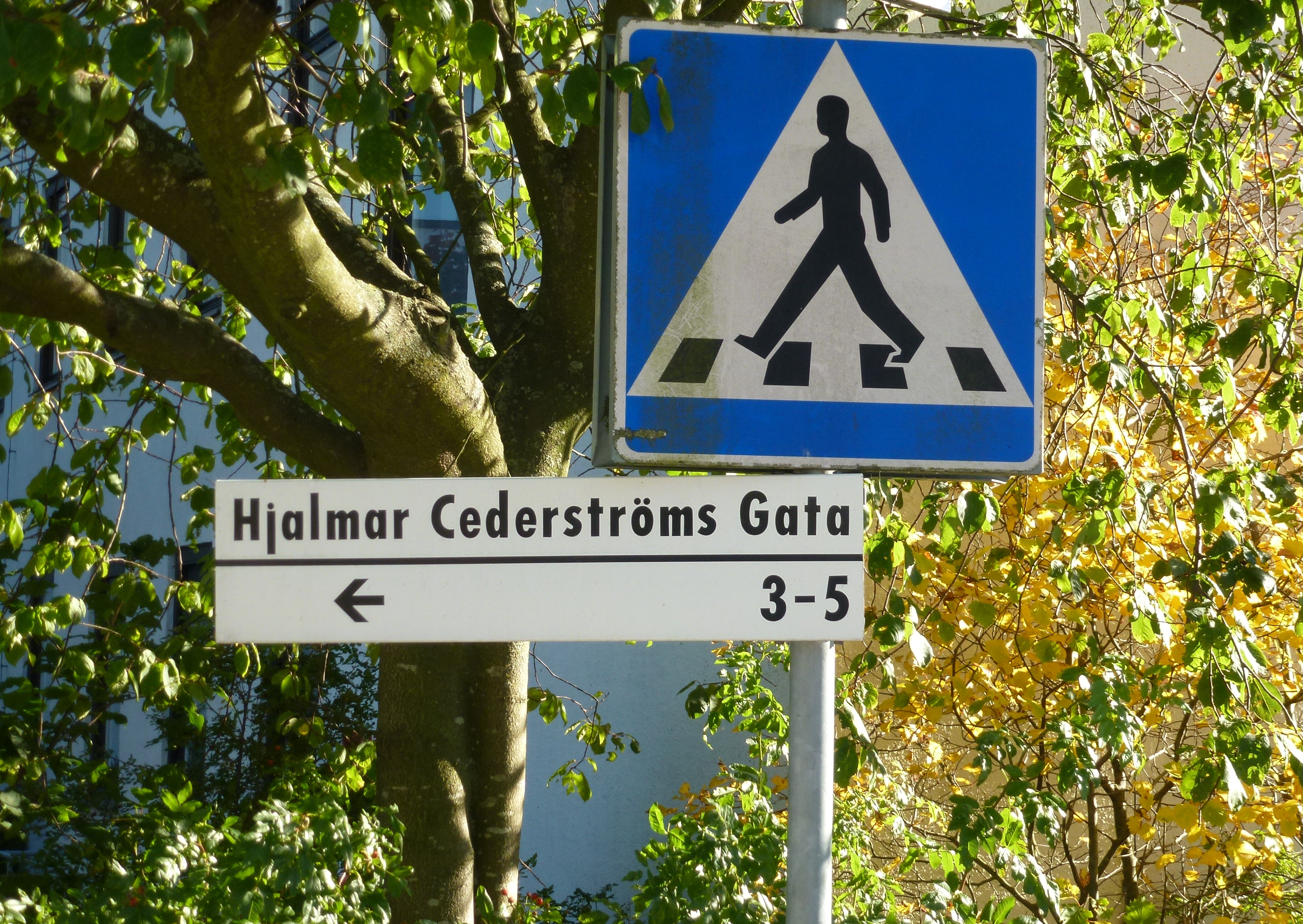 Hjalmar Cederströms gata inom Södersjukhusets område